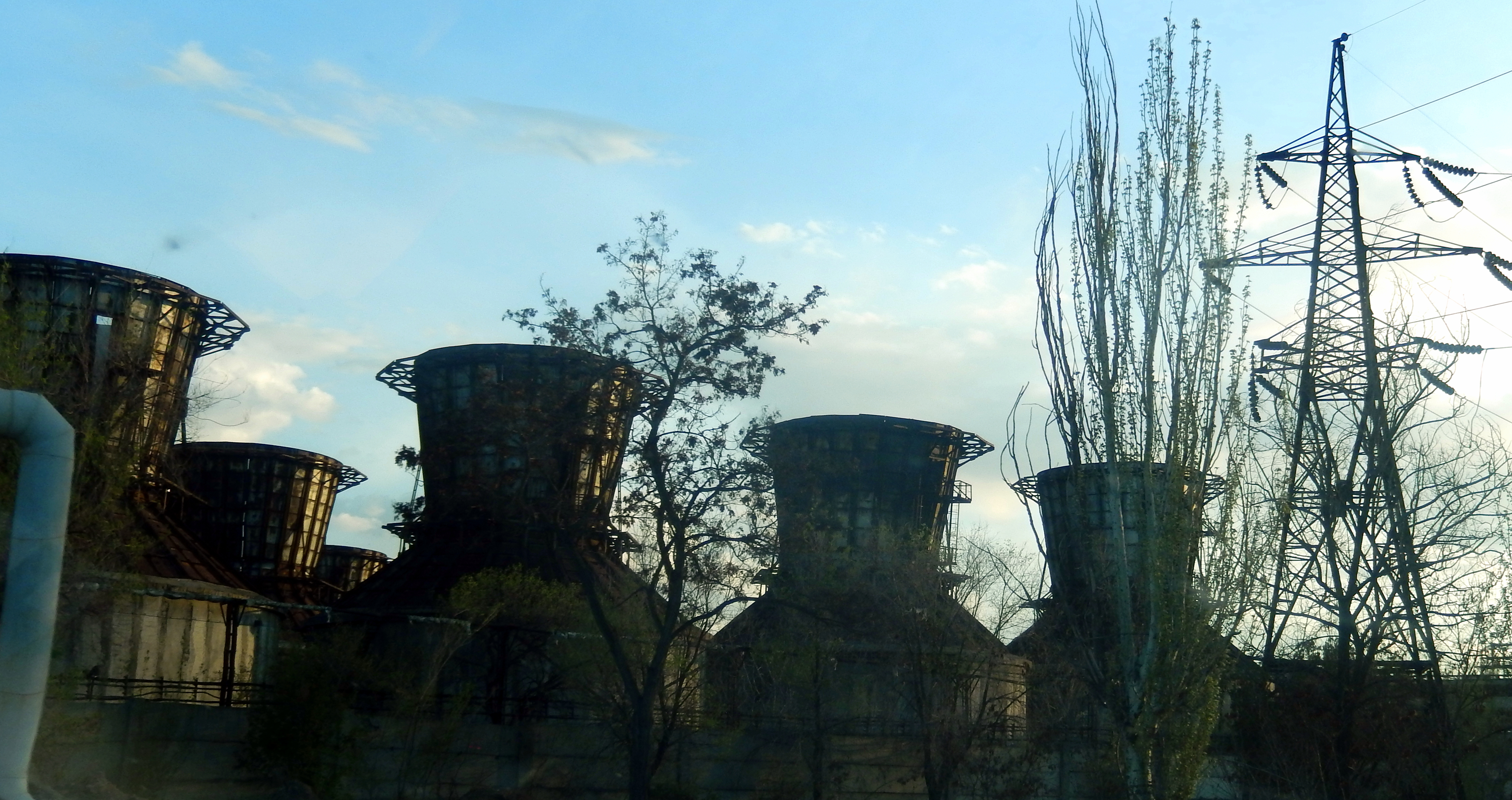 Նաիրիտ գործարան